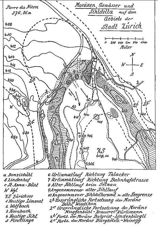 Schuttkegel der Sihl in der Stadt Zürich, Schweiz.